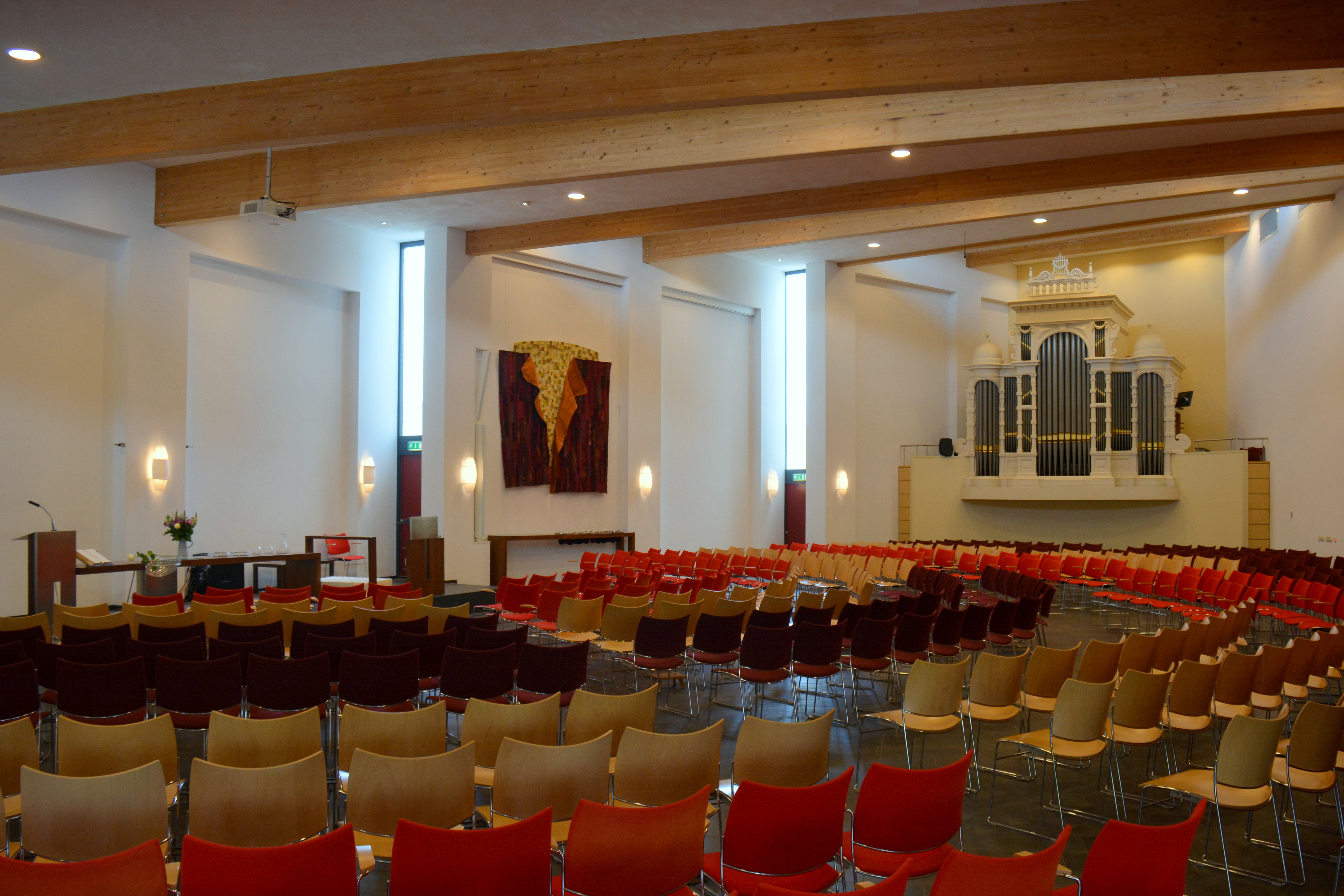 Interieur gereformeerd-vrijgemaakte kerk De Morgenster, Leeuwarden.